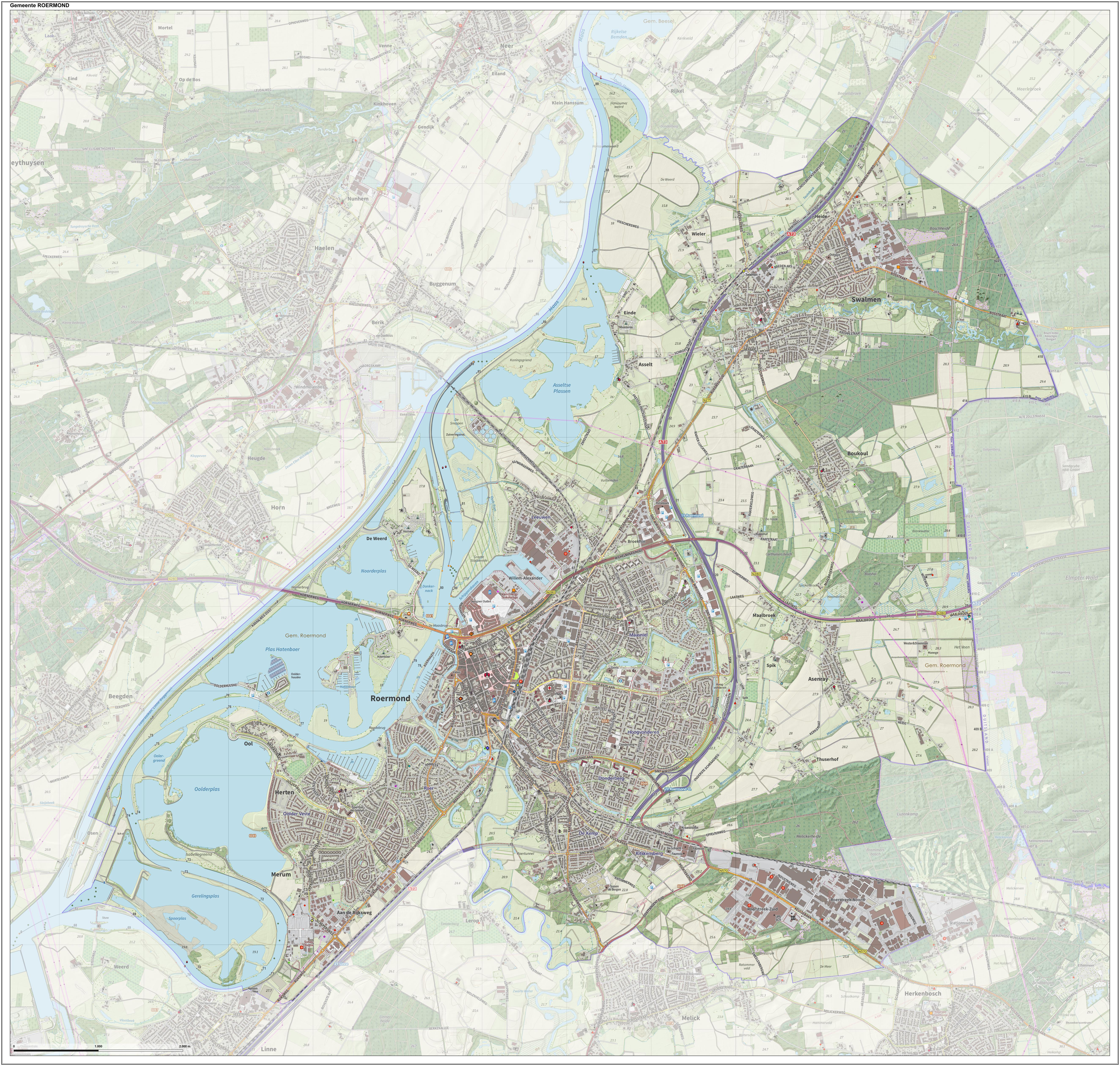 Topografische gemeentekaart. Resolutie: 400 pixels/km. Kaartbeeld samengesteld uit de open geodata van de Top10NL en Top25namen (Kadaster), Creative Commons-BY licentie. Gebouwvlakken uit open geodata BAG extract. Wegen uit de OpenStreetMap, OpenStreetMap community. Reliëfschaduw uit de Actuele Hoogtekaart AHN2. Samenstelling en kleurenschema: Jan-Willem van Aalst, met QGIS. Zie ook de Legenda.